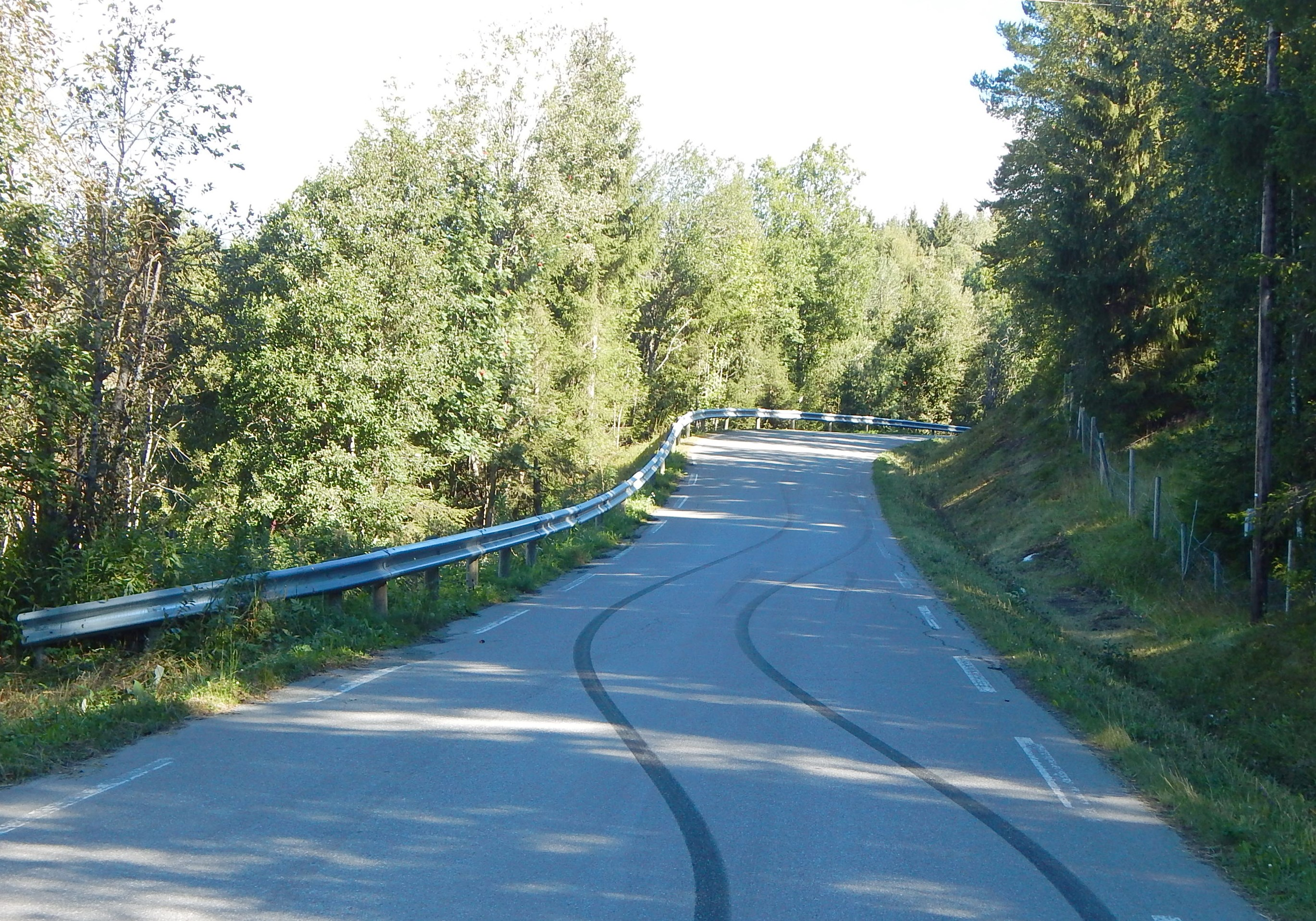 Gilbergsrovegen (tidl. fylkesvei 159, fra 2020 kommunal vei 5466) nær enden mot Snertingdalsvegen (primær fylkesvei 249)